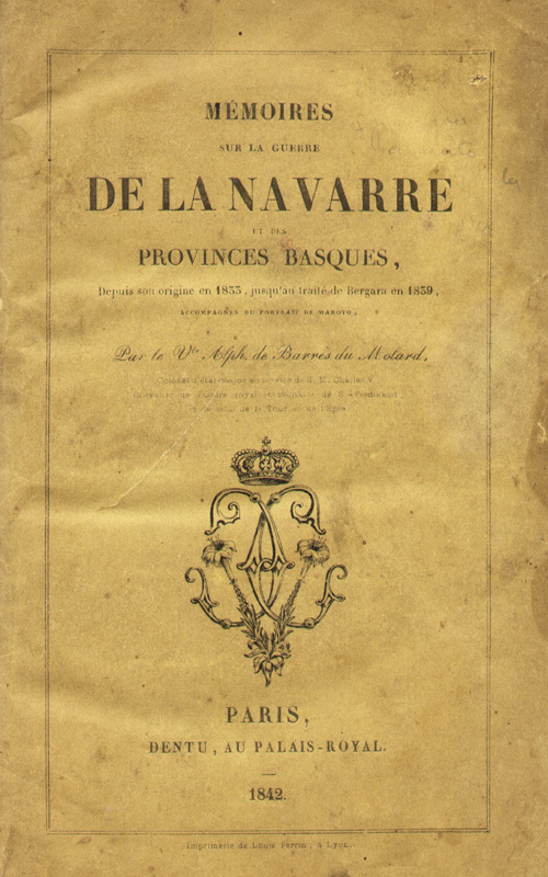 Portada de la obra "Memoires sur la guerre de la Navarre et des Provinces Basques". Alphonse de Barrés de Molard. Paris-Lyon 1842